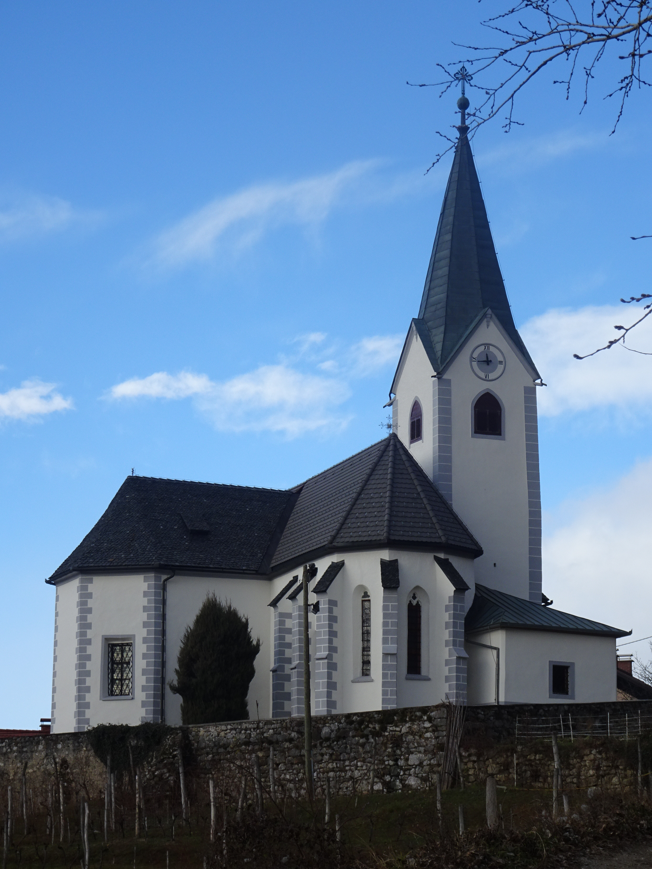 Črešnjice nad Frankolovim